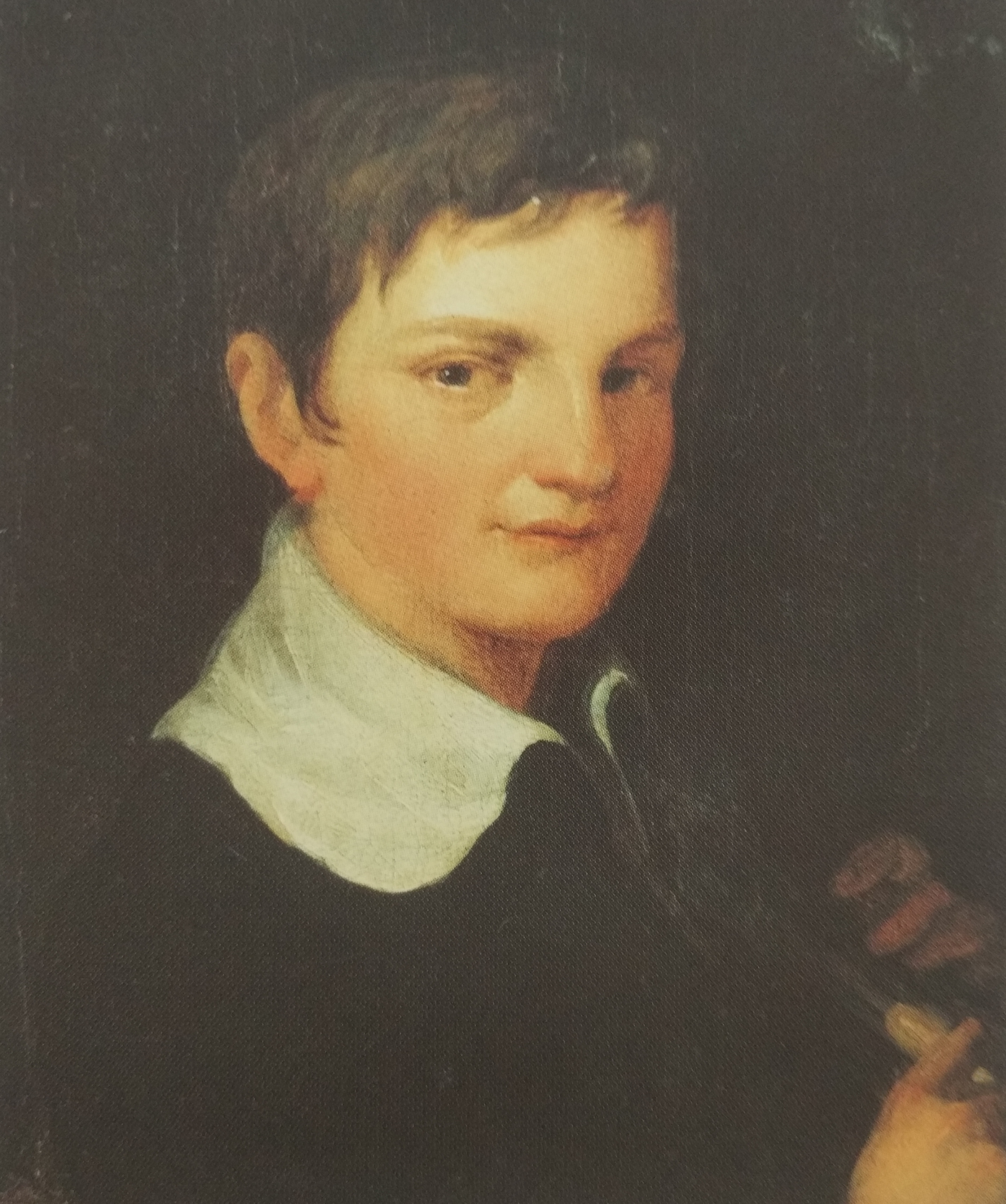 Ян Рустэм. Партрэт Аляксандра Манюшкі